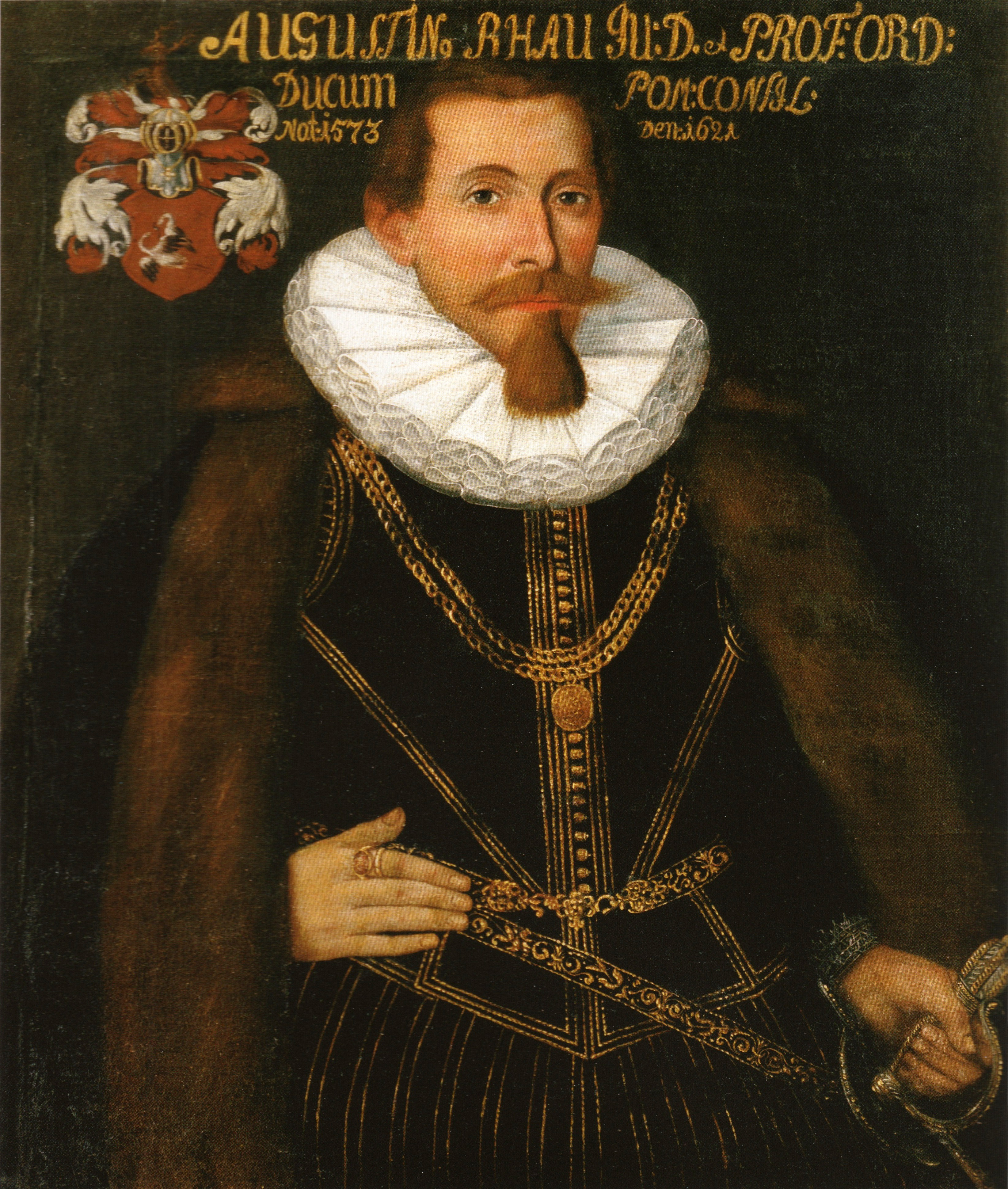 Ölgemälde von Augustin Rhaw.